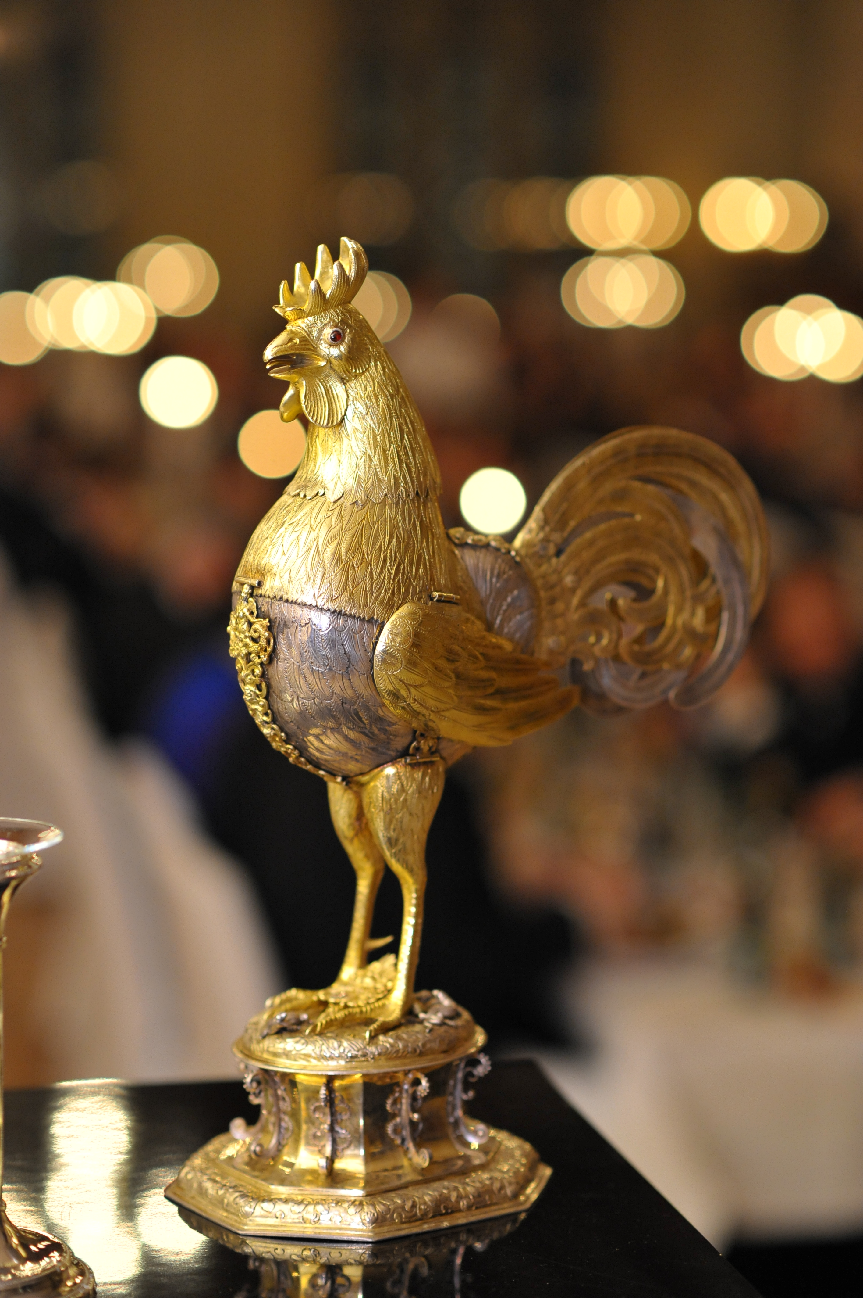 Tradition der Stadt Münster, Ehrengäste erhalten einen Ehrentrunk aus dem „Goldenen Hahn“